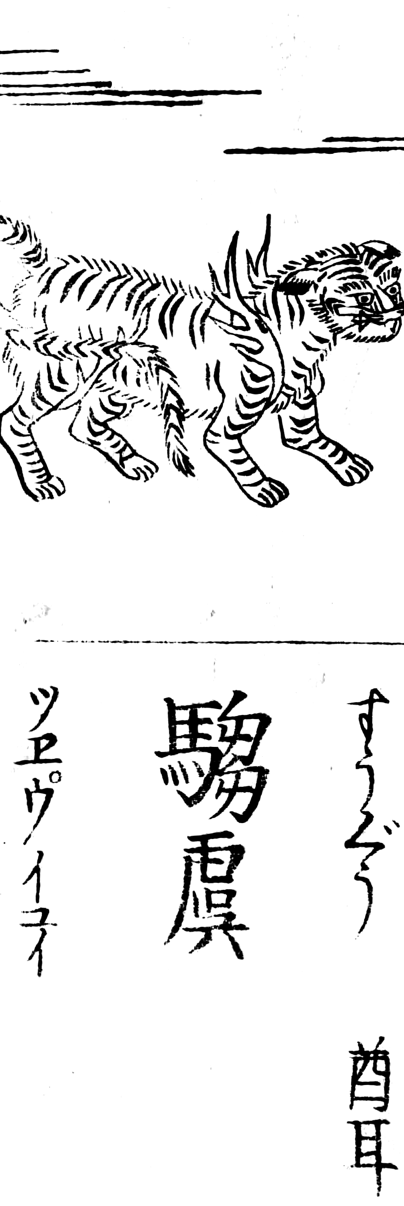 騶虞。『和漢三才図会』（1712年）より 本綱酋耳狀似虎白而黒文尾長於身太平則至不食生物食自死物見虎豹卽殺之 三才圖繪云周文王時見乘之日行千里詩召南壹發五豝于嗟乎騶虞是也 賈誼新書以詩騶虞爲騶人虞人非獸恐鑿説也